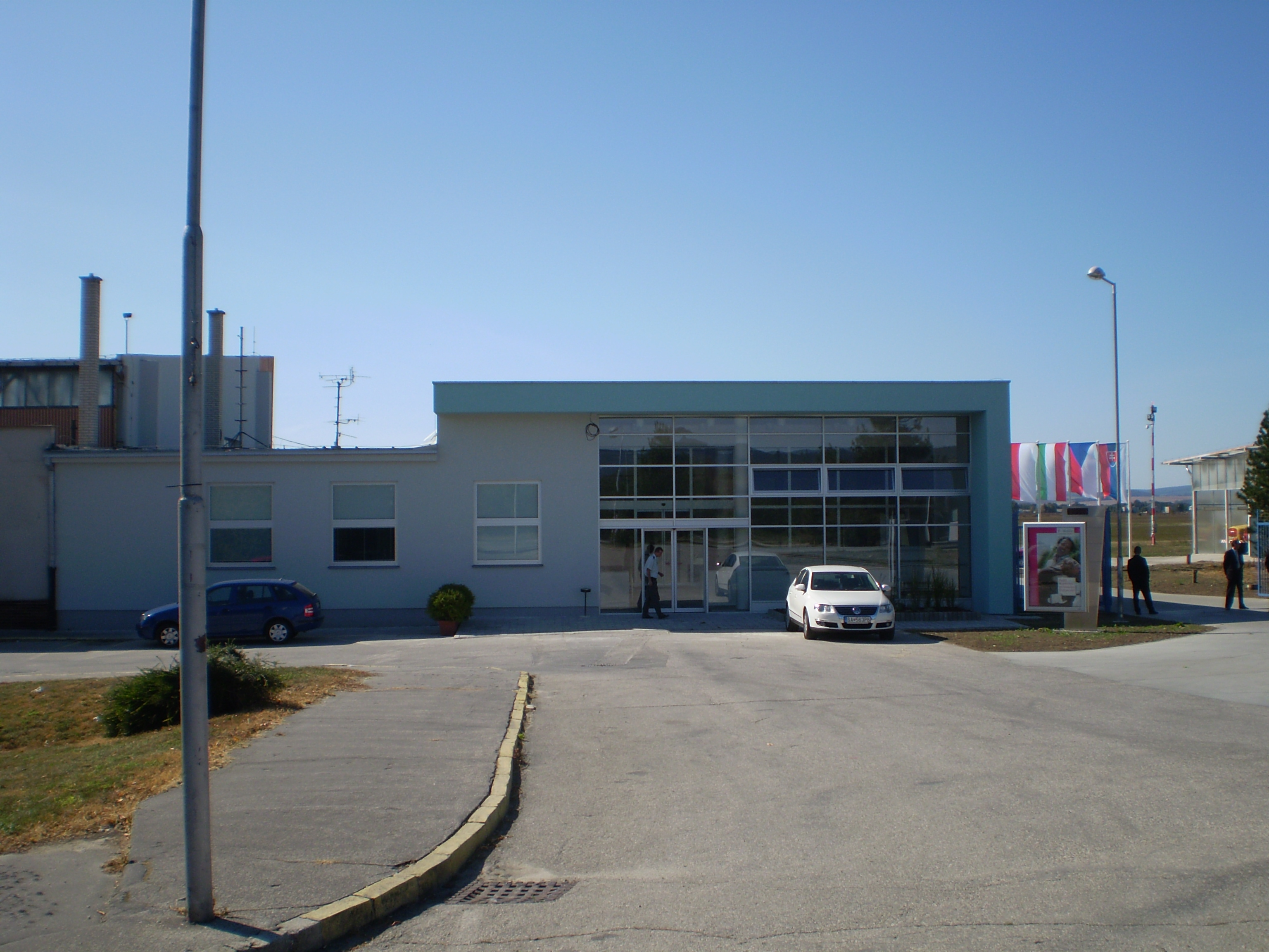 Terminál piešťanského letiska